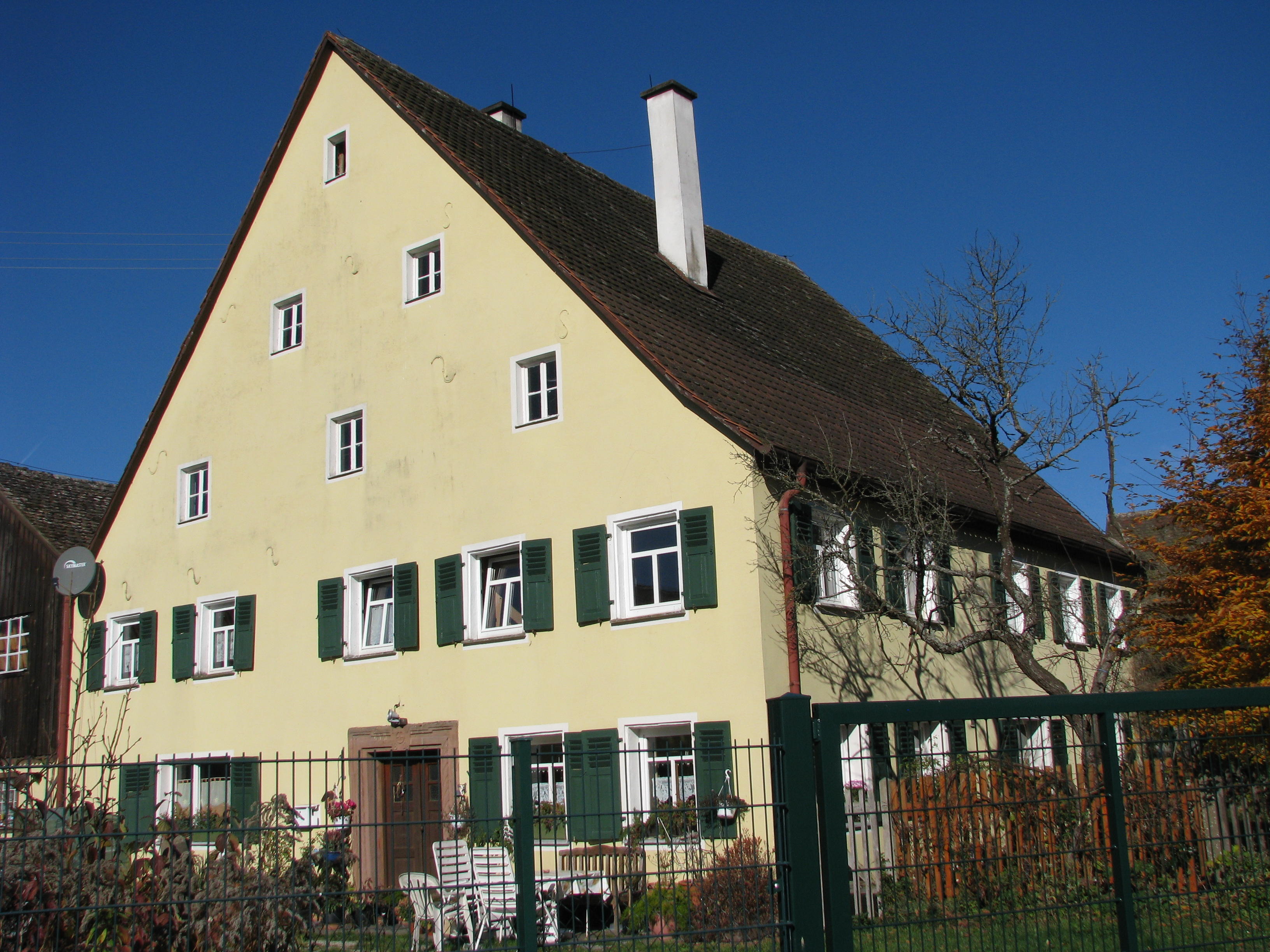 Seitzenmühle, OT von Hilpoltstein im mittelfränkischen Landkreis Roth (Bayern)